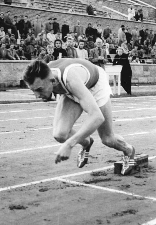 Horst Mann Zentralbild Rostock-Löwe 28.10.1956 Olympiateilnehmer Horst Mann. Bei der Olympiade in Melbourne startet unter anderem auch der Rostocker 400-m-Läufer Horst Mann (DDR). UBz: Horst Mann beim Start zum 400-m-lauf.